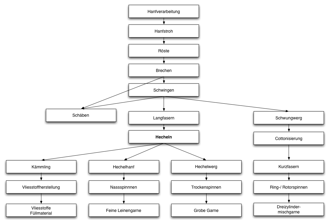 Schema der Verarbeitungsschritte zur Aufbereitung von Hanffasern zur textilen Nutzung